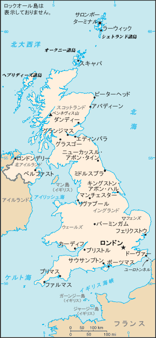 イギリスの地図（日本語版） - CIA World Factbookより日本語化 掲載地名：アバディーン、イングランド、ウェールズ、エディンバラ、オークニー諸島、カーディフ、ガーンジー島、北アイルランド、キングストン・アポン・ハル、グラスゴー、グランジマス、サウサンプトン、サロンボーターミナル、シェトランド諸島、ジャージー島、スキャパ、スコットランド、ダンディー、ドーヴァー、ニューカッスル・アポン・タイン、バーミンガム、ピーターヘッド、ファルマス、フェリクストウ、フェンズ、ブリストル、プリマス、ヘブリディーズ諸島、ベルファスト、ベンネヴィス山、ポーツマス、マンチェスター、マン島、ミドルスブラ、ユーロトンネル、ラーウィック、リヴァプール、ロンドン、ロンドンデリー、北大西洋、北海、アイリッシュ海、ケルト海、イギリス海峡